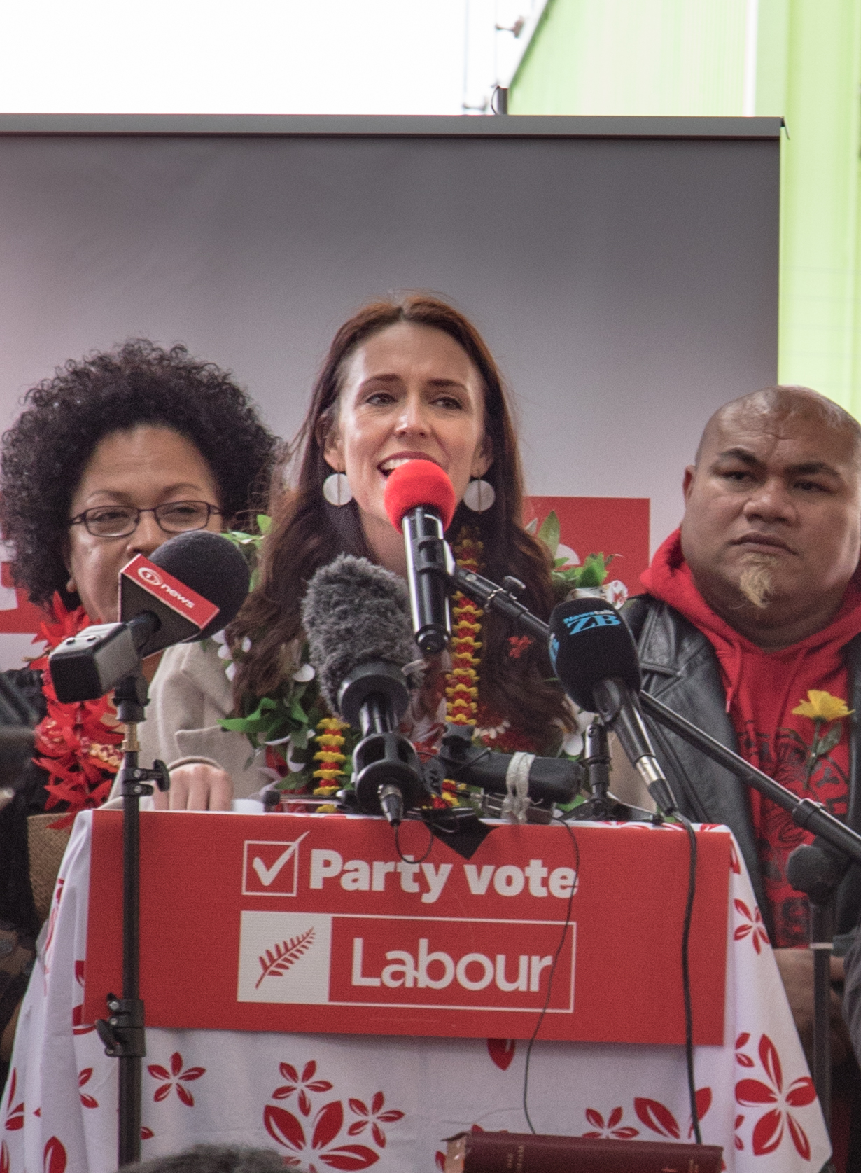 Labour-Pacfic-Launch-20